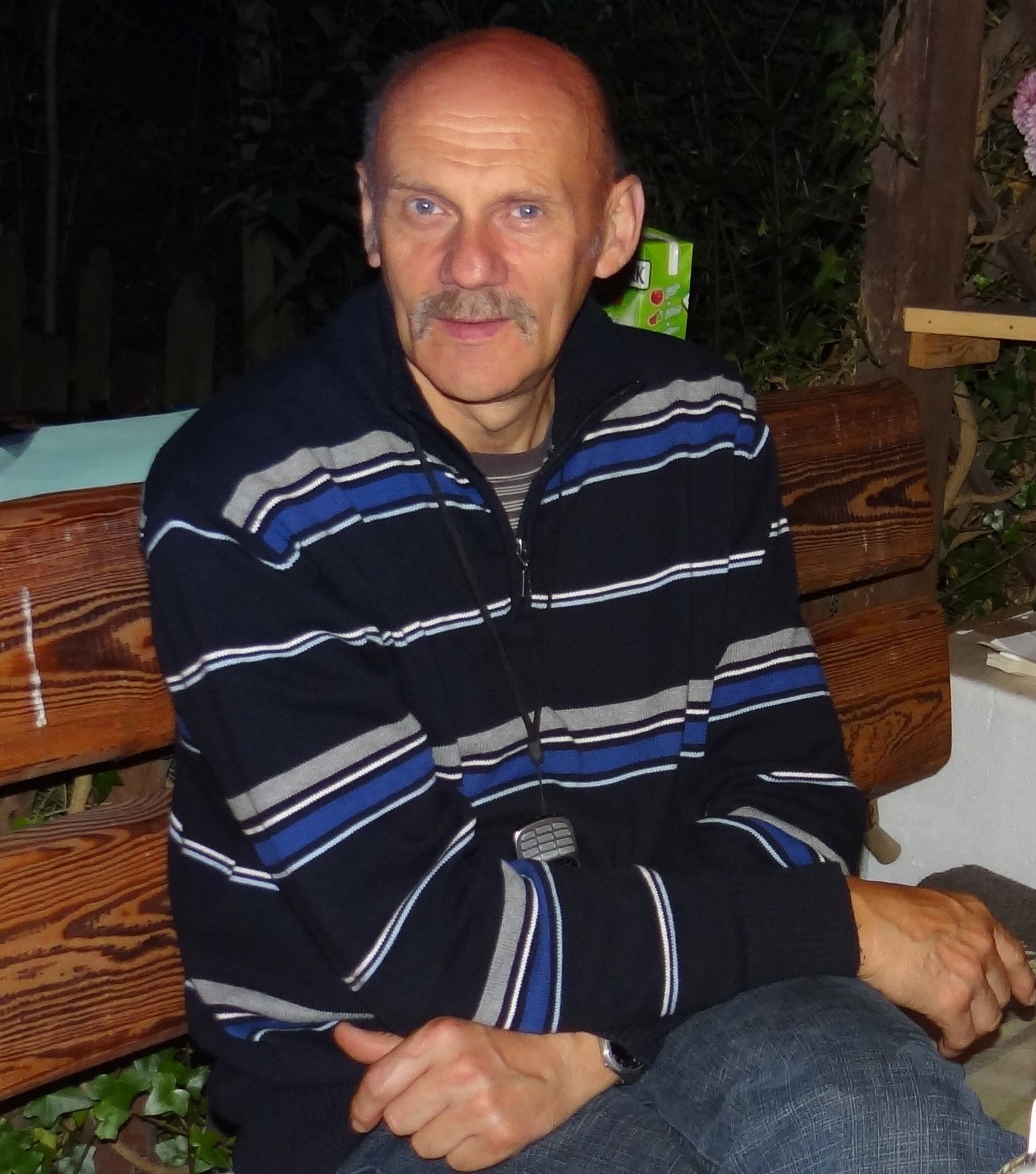 Stargard, 2011r. Grzegorz Żyłczyński